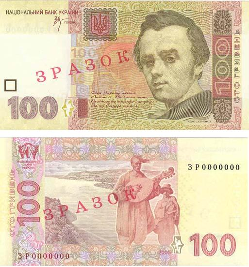 100-Hrywnja-Schein, 2006